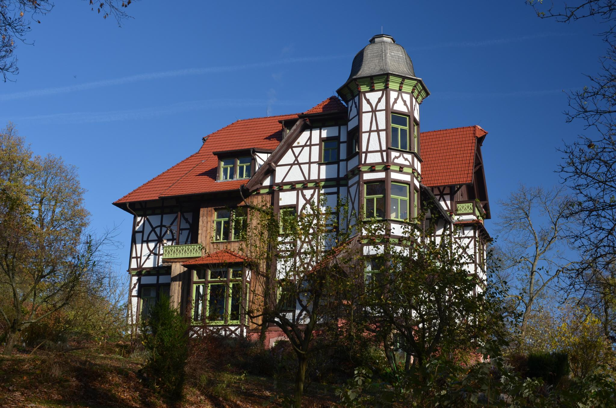 Eisenach Impressionen